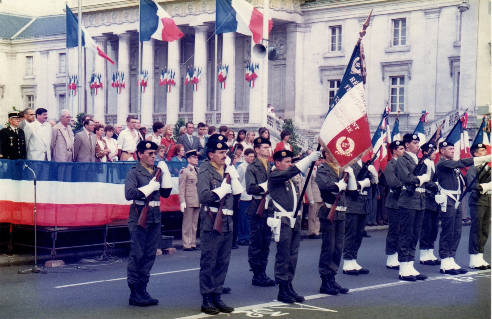 Drapeau et garde d'honneur du 32e RID (régiment d'infanterie divisionnaire) de réserve, le 14 juillet 1985, place du Palais à Tours. Porte-drapeau : ... Photo prise par Alain Darles, capitaine ORSEM à l'époque, affecté au régiment